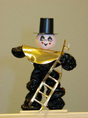 Dresdner Pflaumentoffel (Plum's man)